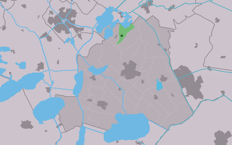 Kaartsje fan himrik fan Terkaple